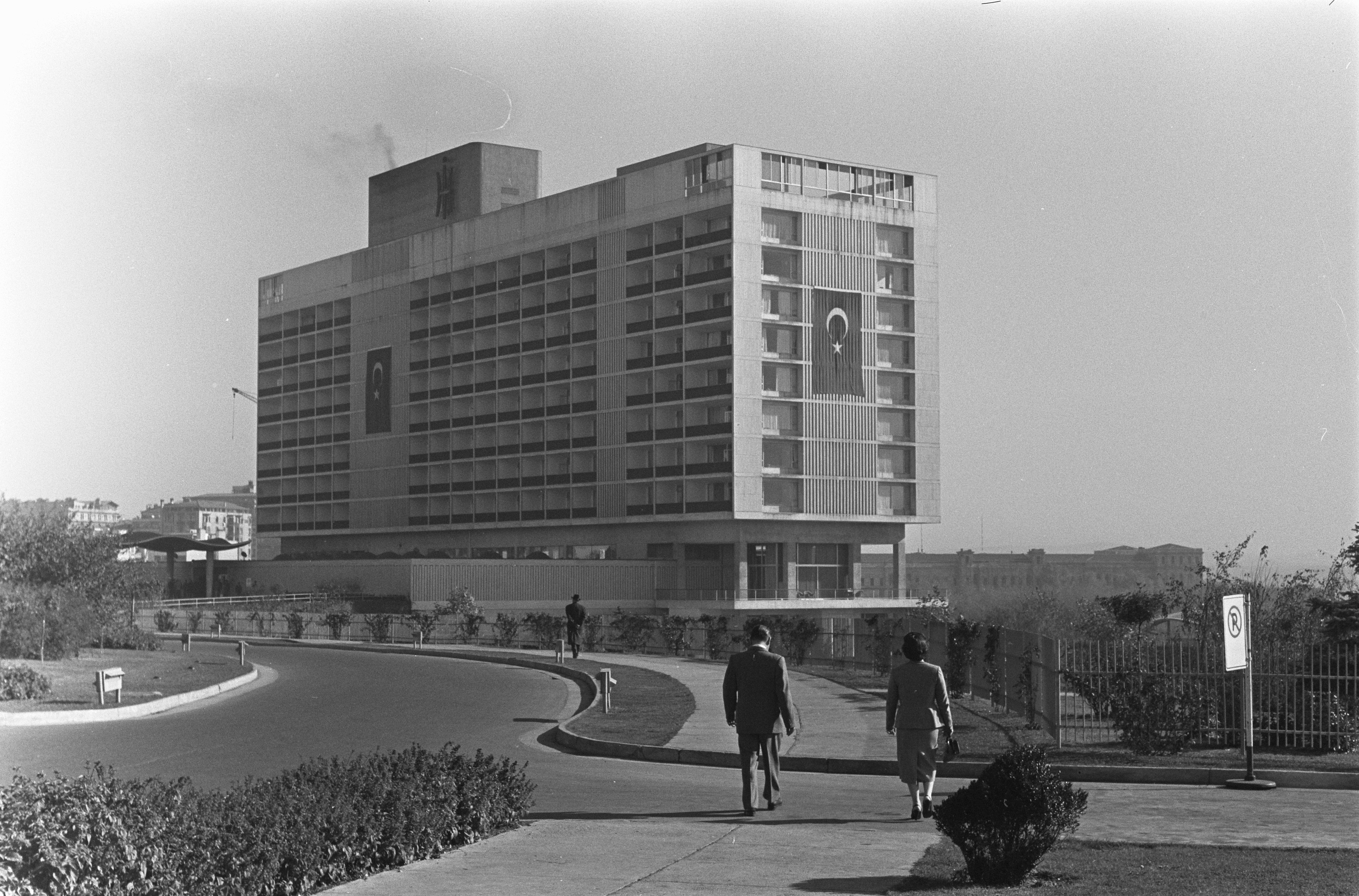 Collectie / Archief : Fotocollectie Anefo Reportage / Serie : [ onbekend ] Beschrijving : Hilton Hotel Istanbul, 1959. Vraagteken vlucht Lockheed Electra naar Istanbul. Datum : 29 oktober 1959 Locatie : Istanboel Trefwoorden : hotels, steden Instellingsnaam : Hilton Hotel, Lockheed Electra Fotograaf : Pot, Harry / Anefo Auteursrechthebbende : Nationaal Archief Materiaalsoort : Negatief (zwart/wit) Nummer archiefinventaris : bekijk toegang 2.24.01.05 Bestanddeelnummer : 910-7821